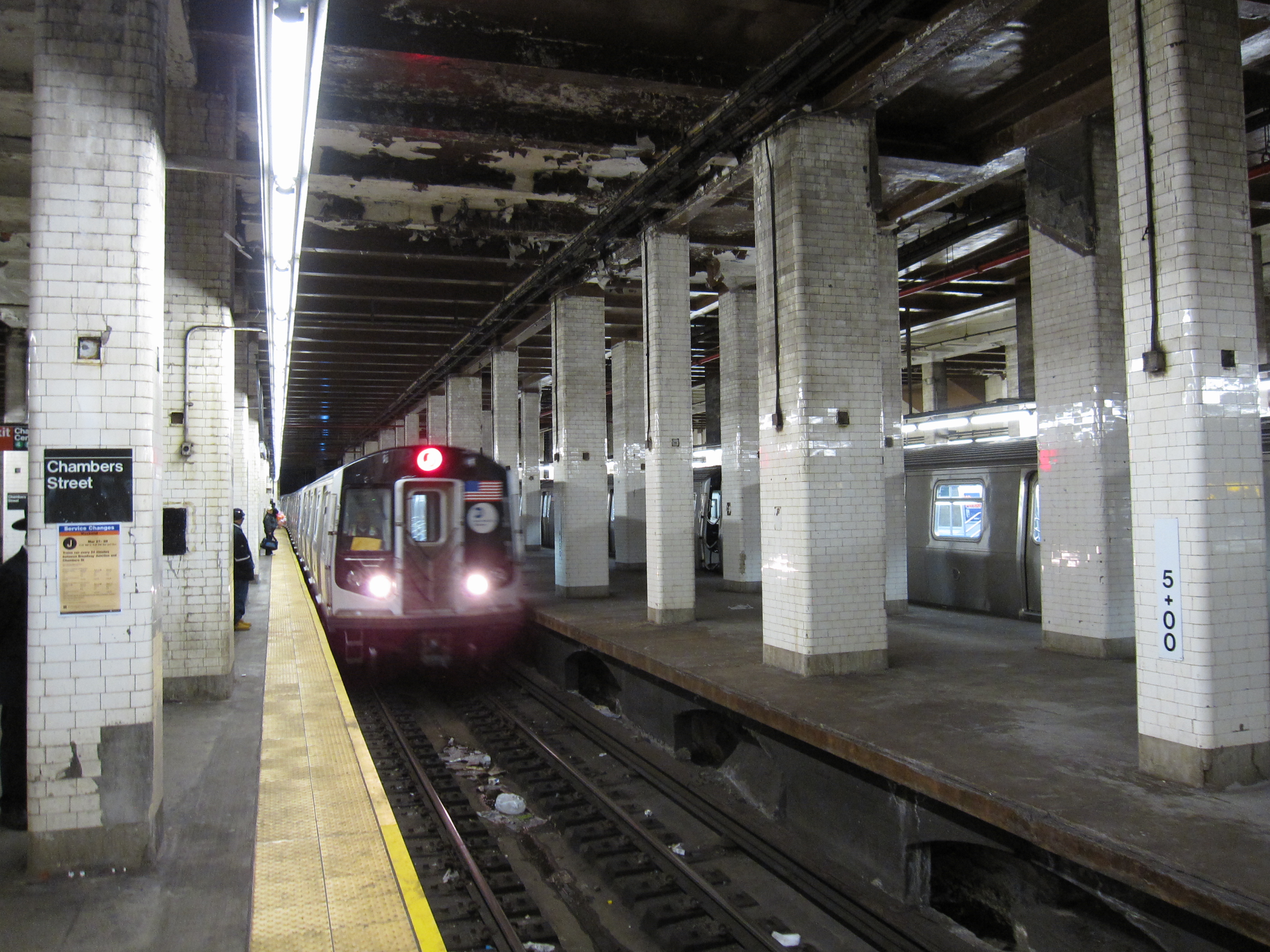 Chambers Street (BMT Nassau Street Line)